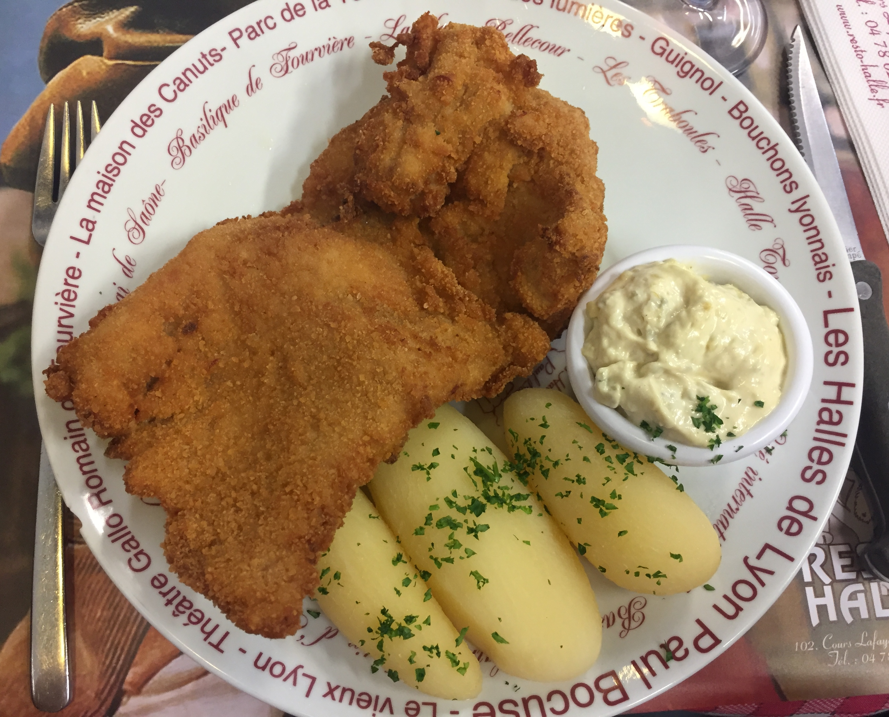 Un tablier de sapeur accompagné de pommes de terre, servi au "Resto Halle" aux Halles de Lyon-Paul Bocuse, lors du repas consécutif à l'AG ordinaire de l'association Open Food Facts.